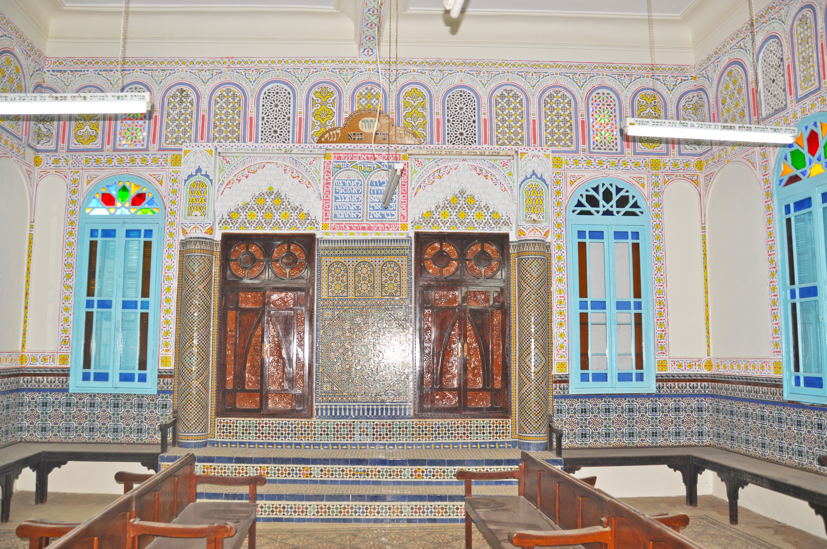 בית כנסת ותלמוד תורה אם הבנים בצפרו